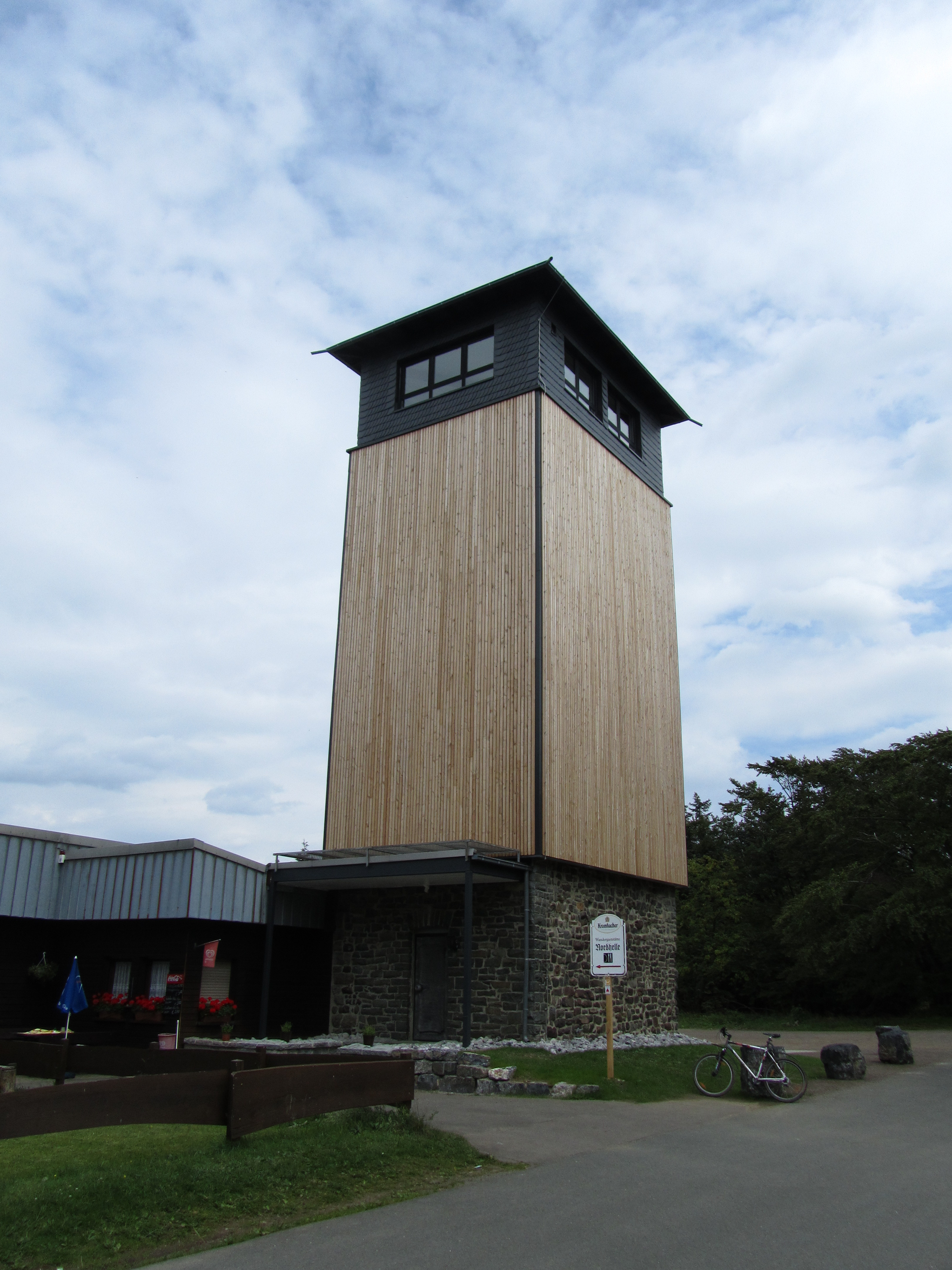 Der Robert-Kolb-Turm auf der Nordhelle 2011 nach umfangreichen Sanierungsmaßnahmen